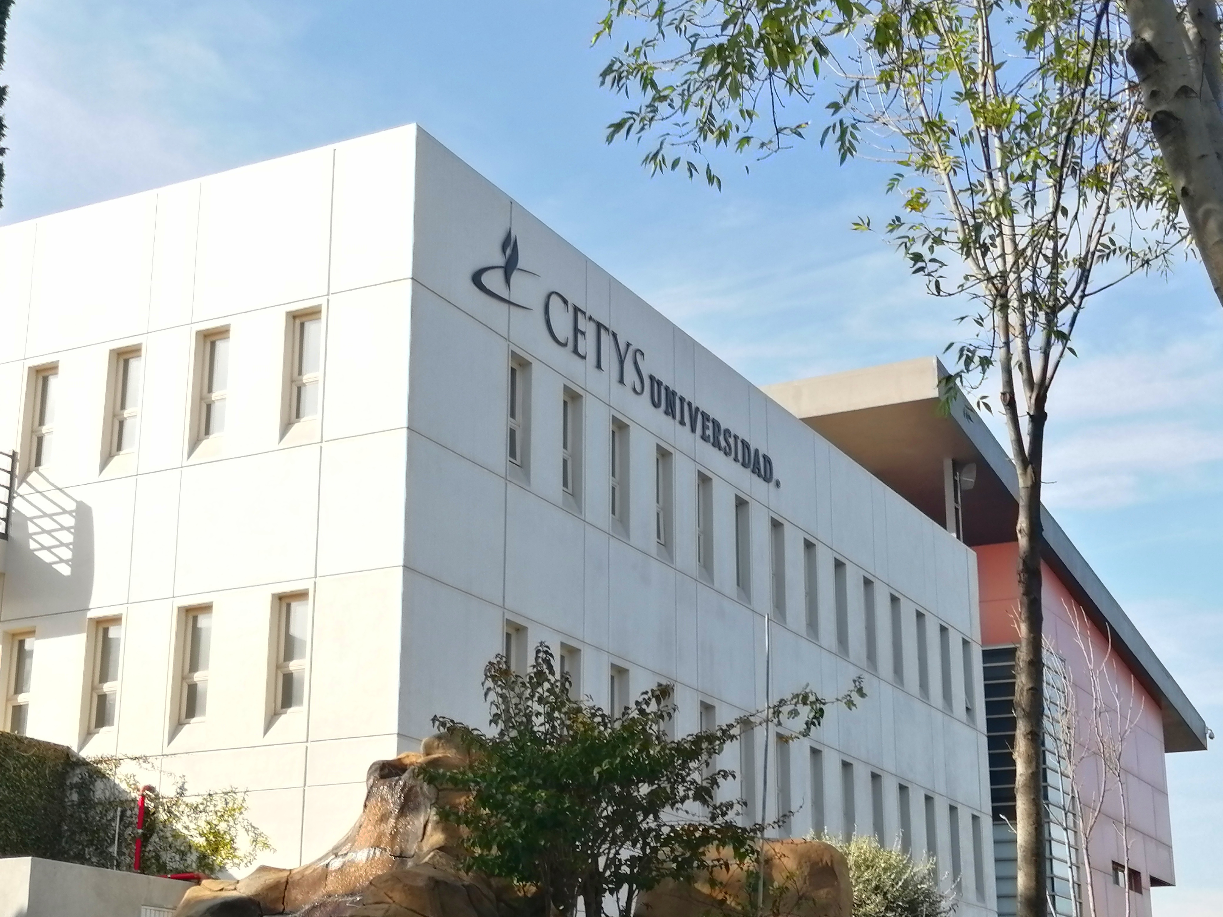 Cetys Universidad campus Tijuana, edificio de posgrado "José Fimbres Moreno"